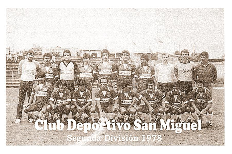 El equipo de San Miguel estuvo muy poco tiempo en la primera divisiòn, sin embargo tenia la cualidad de buscar buenos talentos en canchas abiertas en todo el paìs. Sus apoderados buscaron la opcion de volver al fùtbol de la màxima categorìa. Campeòn de Segunda Divisiòn en 1978- 1979